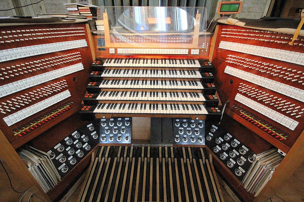 Az 5 manuálos orgona játszóasztala